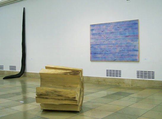 Große Kunstausstellung Haus der Kunst München 2007 mit dem Bild "Wasserspiegel" von Reinhard Fritz (Leihgabe einer Privatsammlung in München)